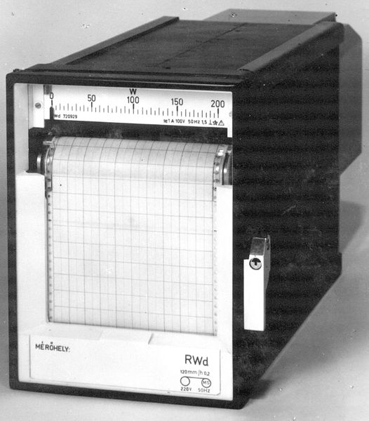 Vonalíró teljesítménymérő műszer.